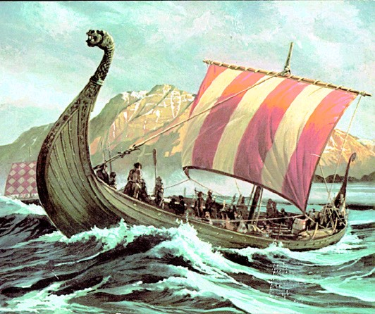 hard/punk metal anarquista